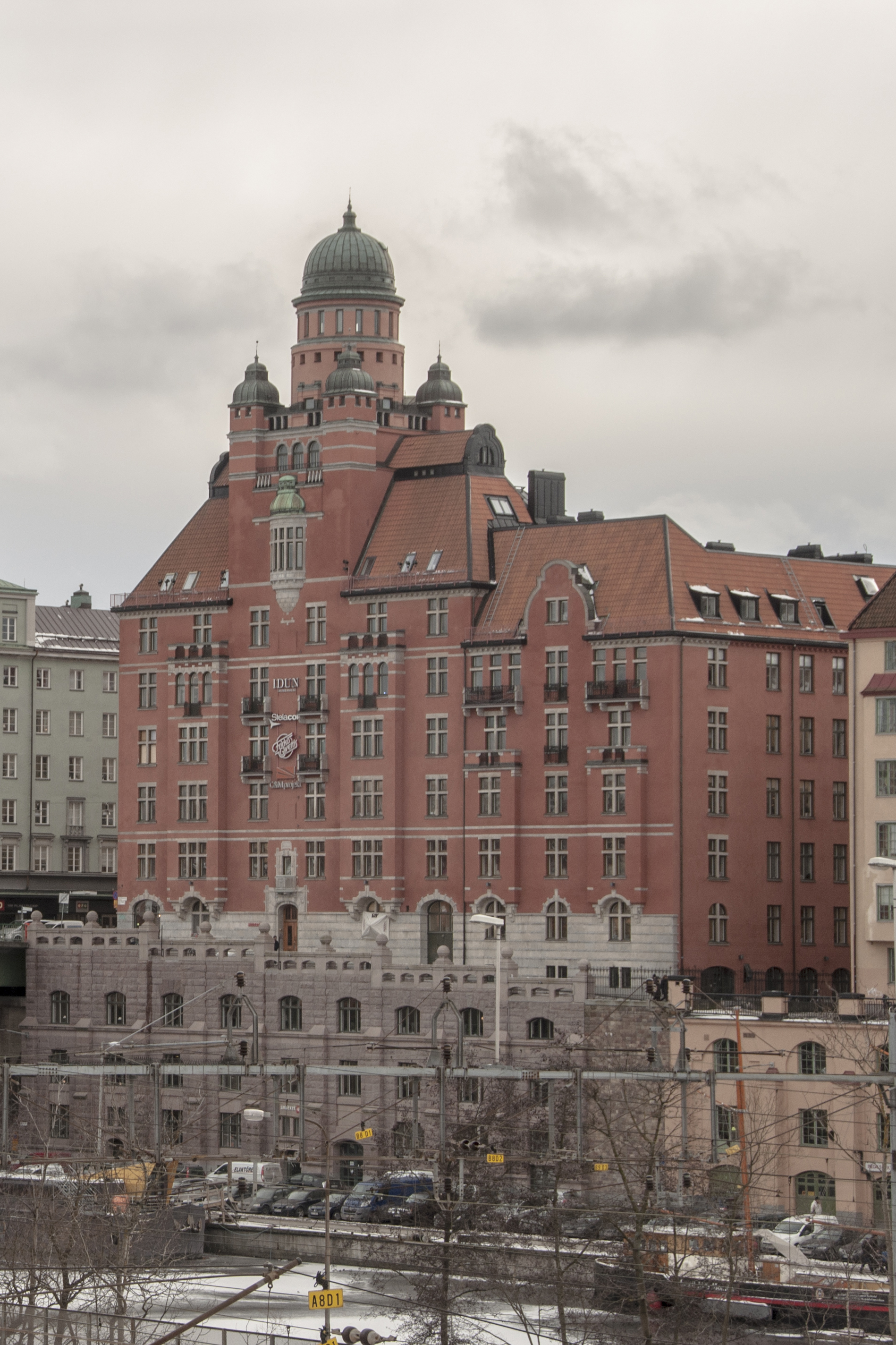 Sankt Erikspalatset, Nybyggnadsår 1907 - 1910, Dorph & Höög (Arkitekt) Fastighets AB Kettingen (Byggherre) G. Larsson (Byggherre) L. Nordenström (Byggmästare)